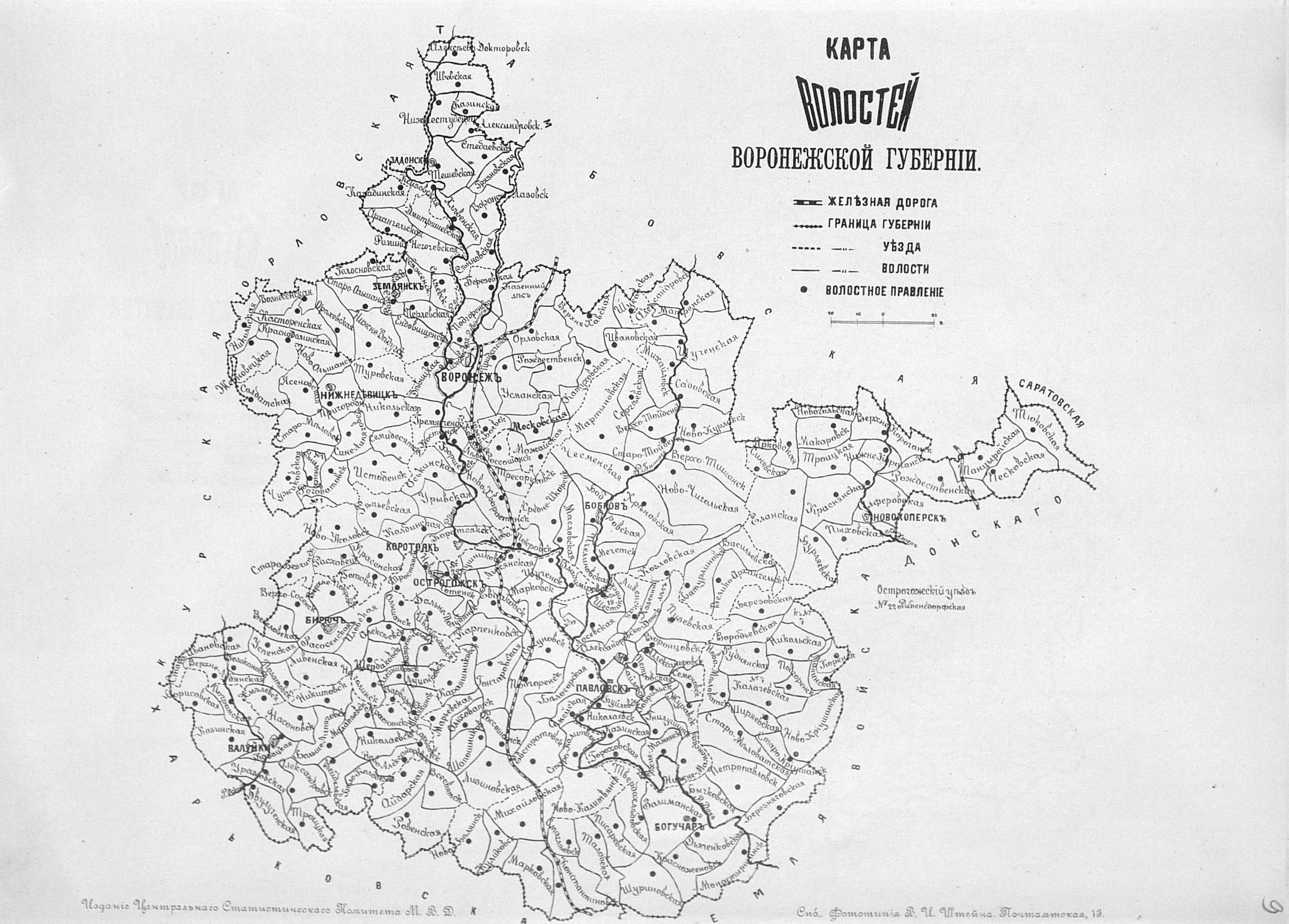 Карта волостей Воронежской губернии